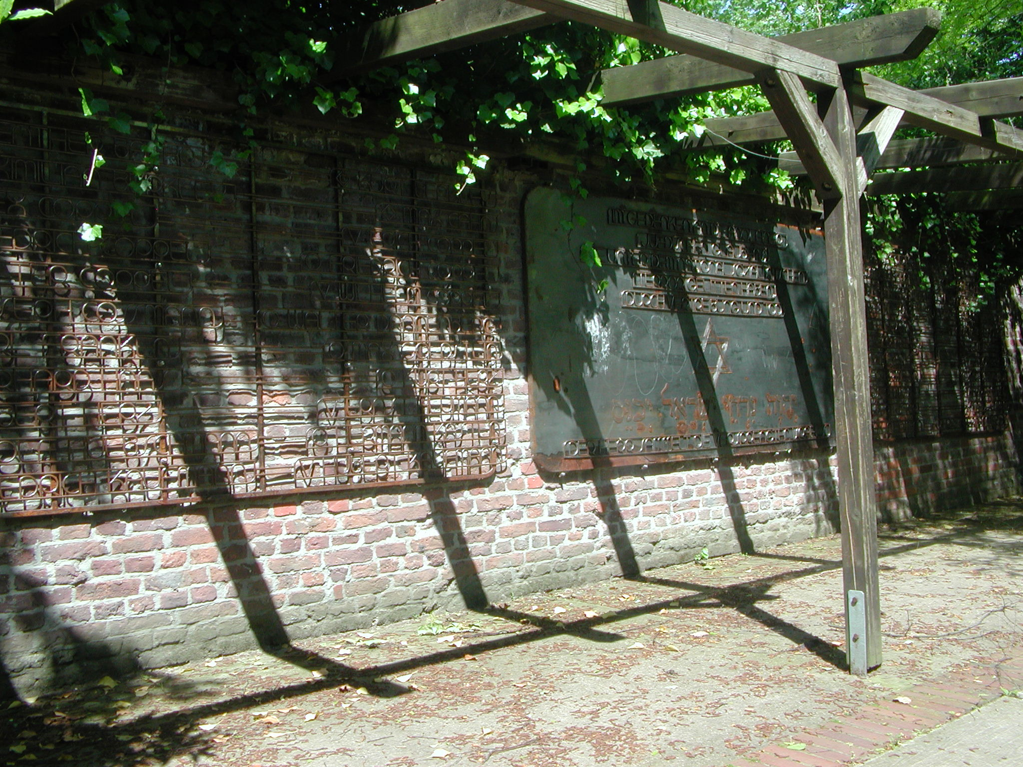 Gedenktafel für die ehemaligen jüdischen Schüler des Gymnasium Adolfinum Moers (Gesamtansicht)